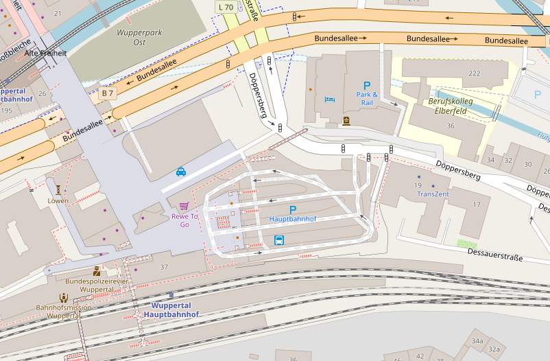 OpenStreetMap: Wuppertal Hauptbahnhof (Busbahnhof)